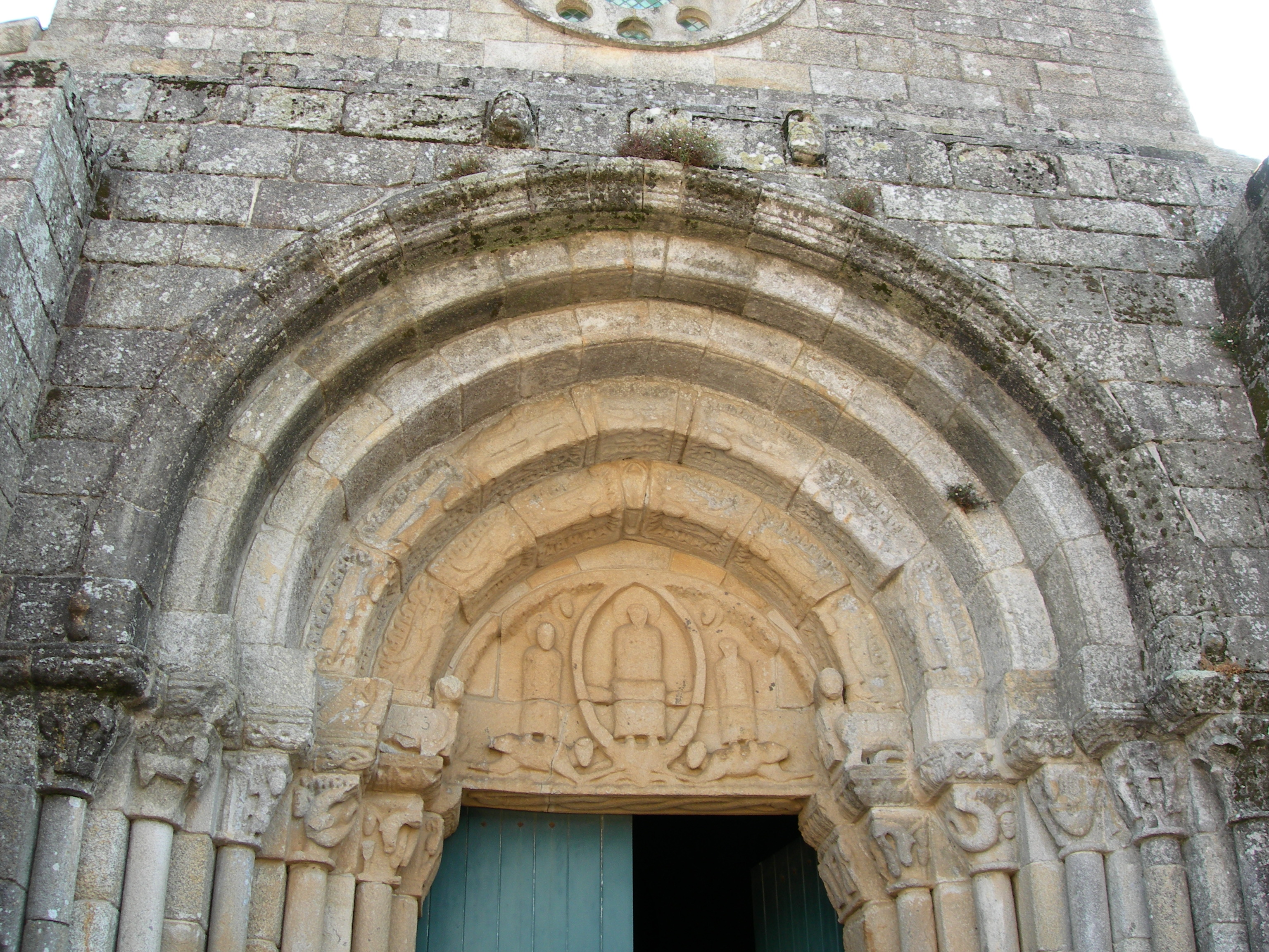 Igreja de São Pedro de Rates VI This file was uploaded for Wiki Loves Monuments in Portugal with the unique identifier 70220.